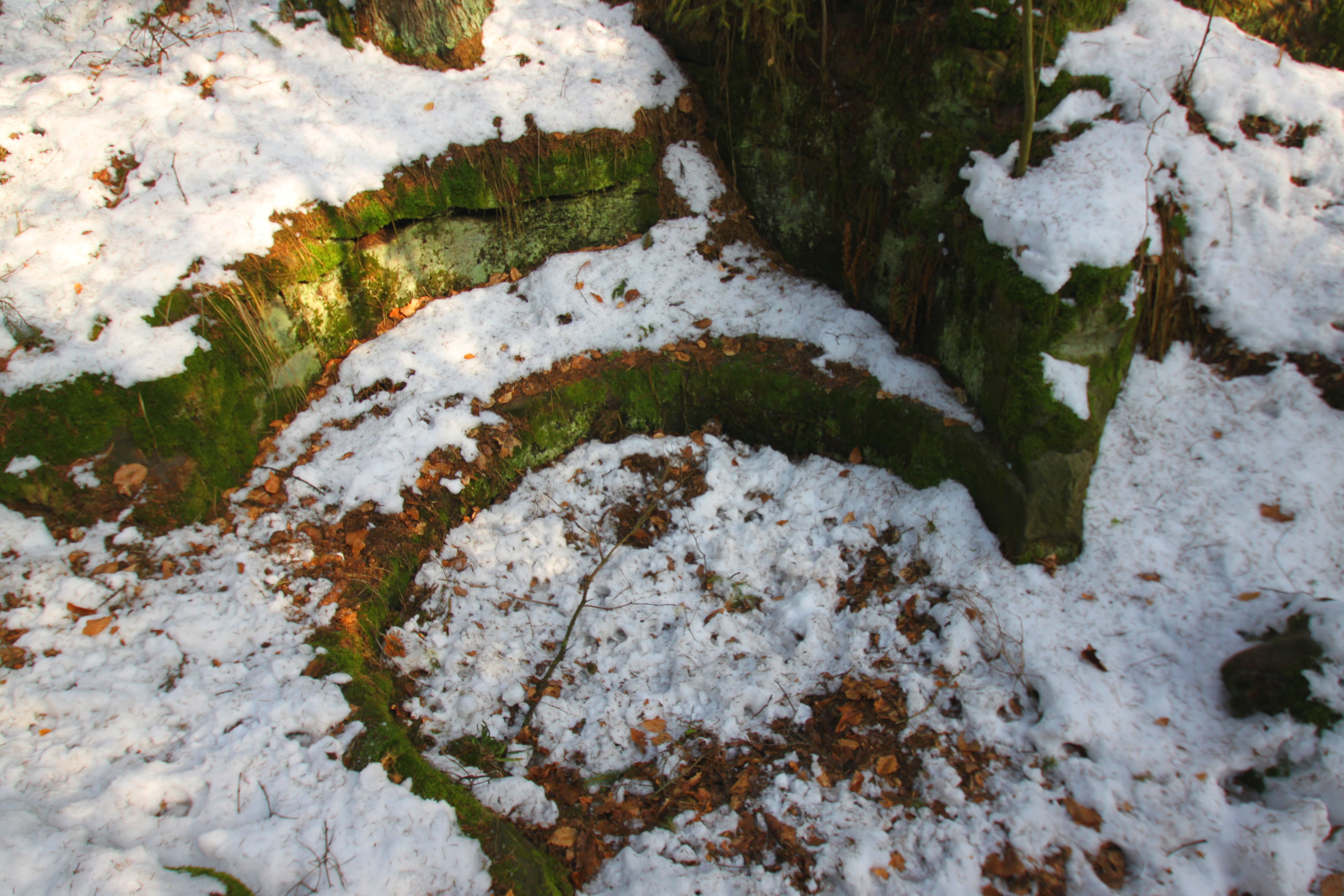 Geotop 477G002 nordöstlich von Leuchau in Kulmbach, Steinerner Vogelherd genannt, Schurf